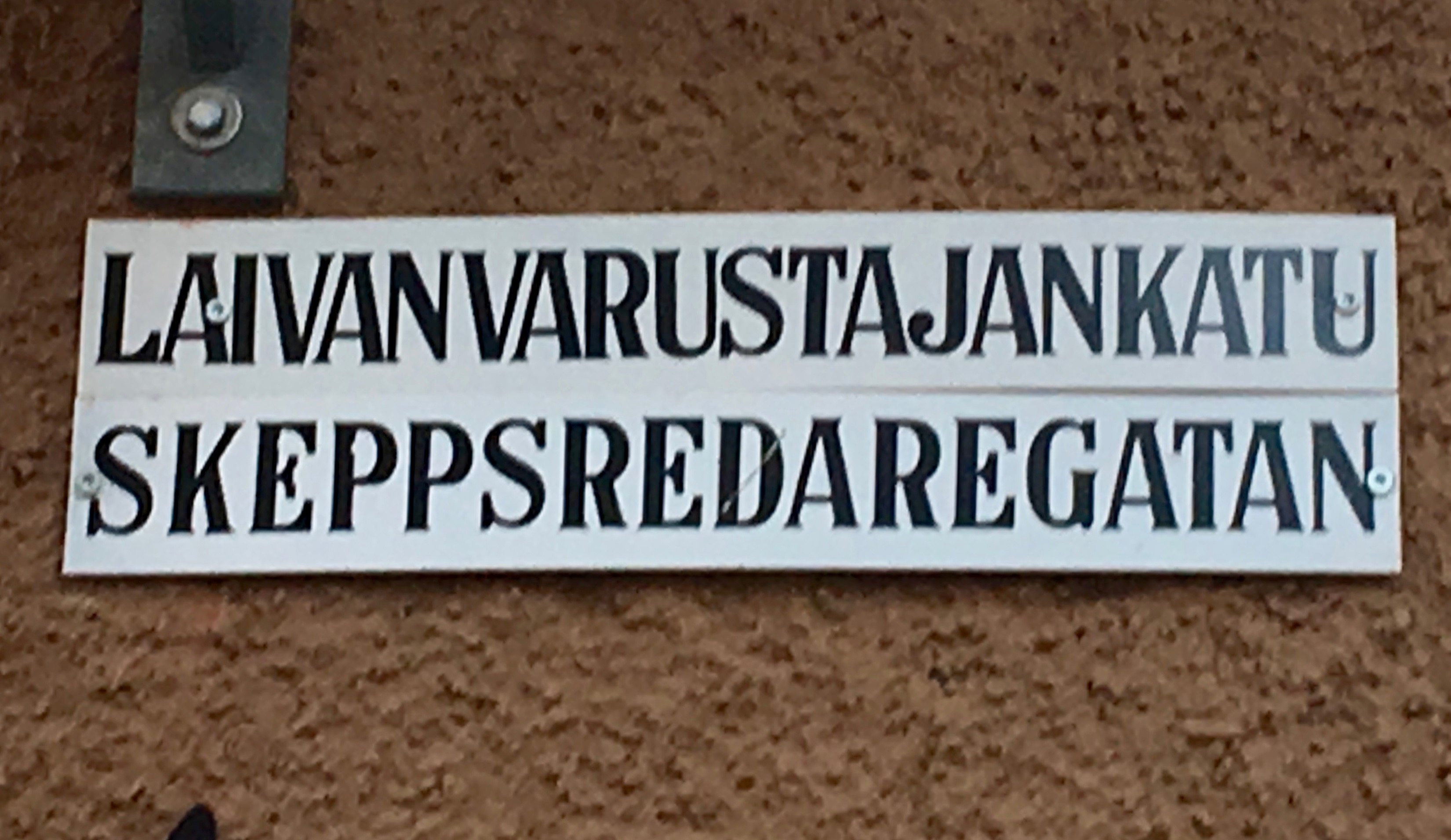 Laivanvarustajankadun nimikyltti Helsingin Ullanlinnassa Laivanvarustajankatu